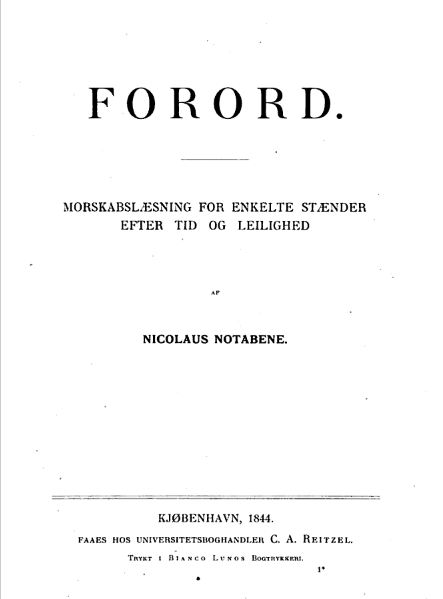 Publication of Prefaces in the Danish Language